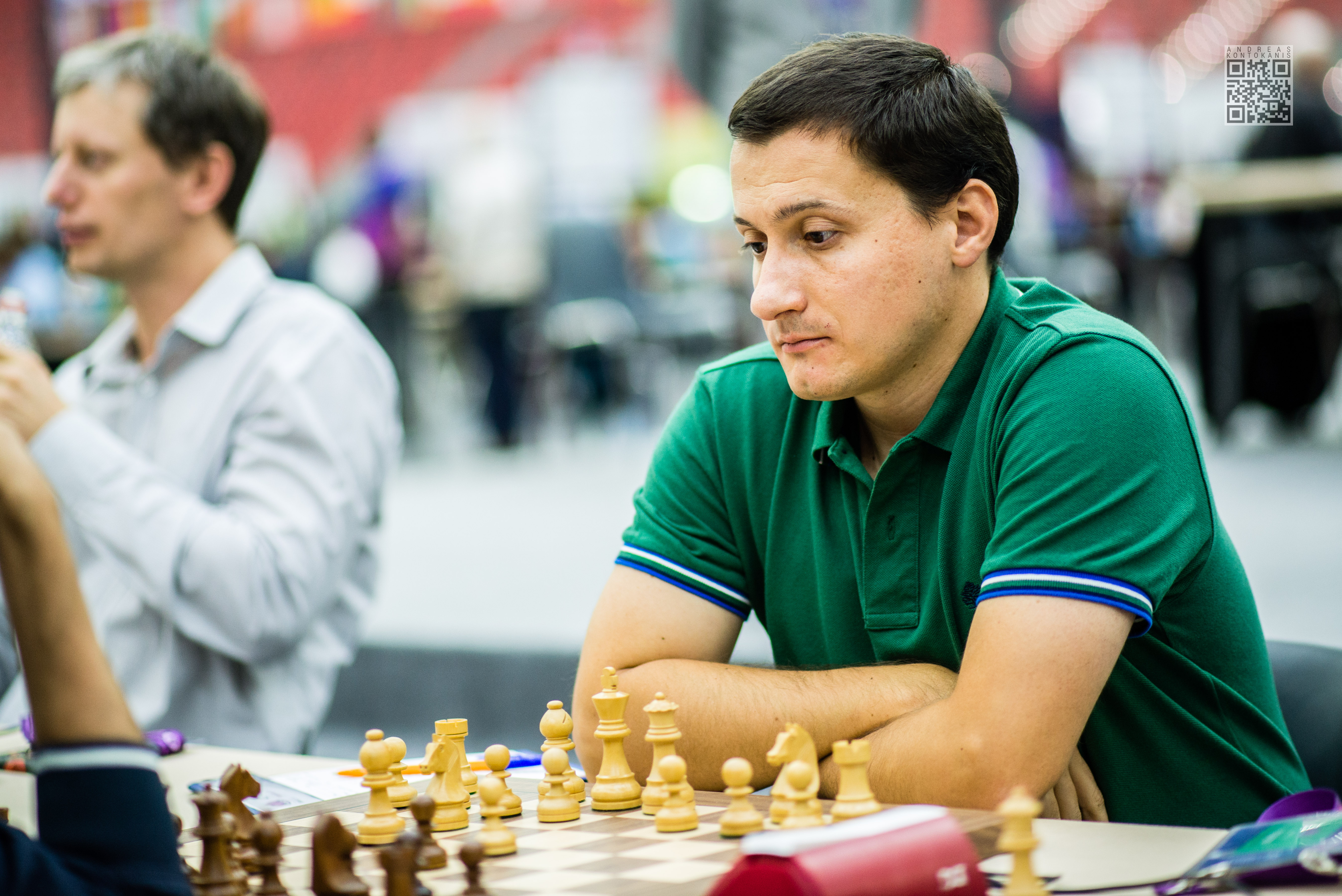 Berkes Ferenc